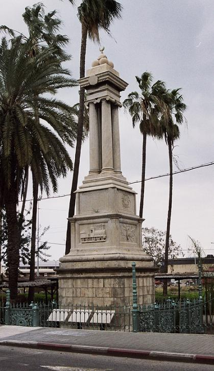 האנדרטה לרגל חנוכת רכבת העמק בחיפה.צילום לכיוון צפון מערב.צילמתי והעלתי במרץ 2006.אסף.צ 21:00, 11 מרץ 2006 (UTC)